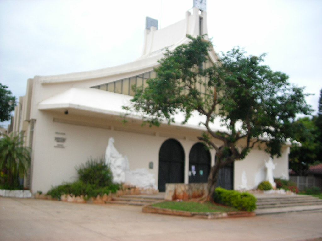 igl